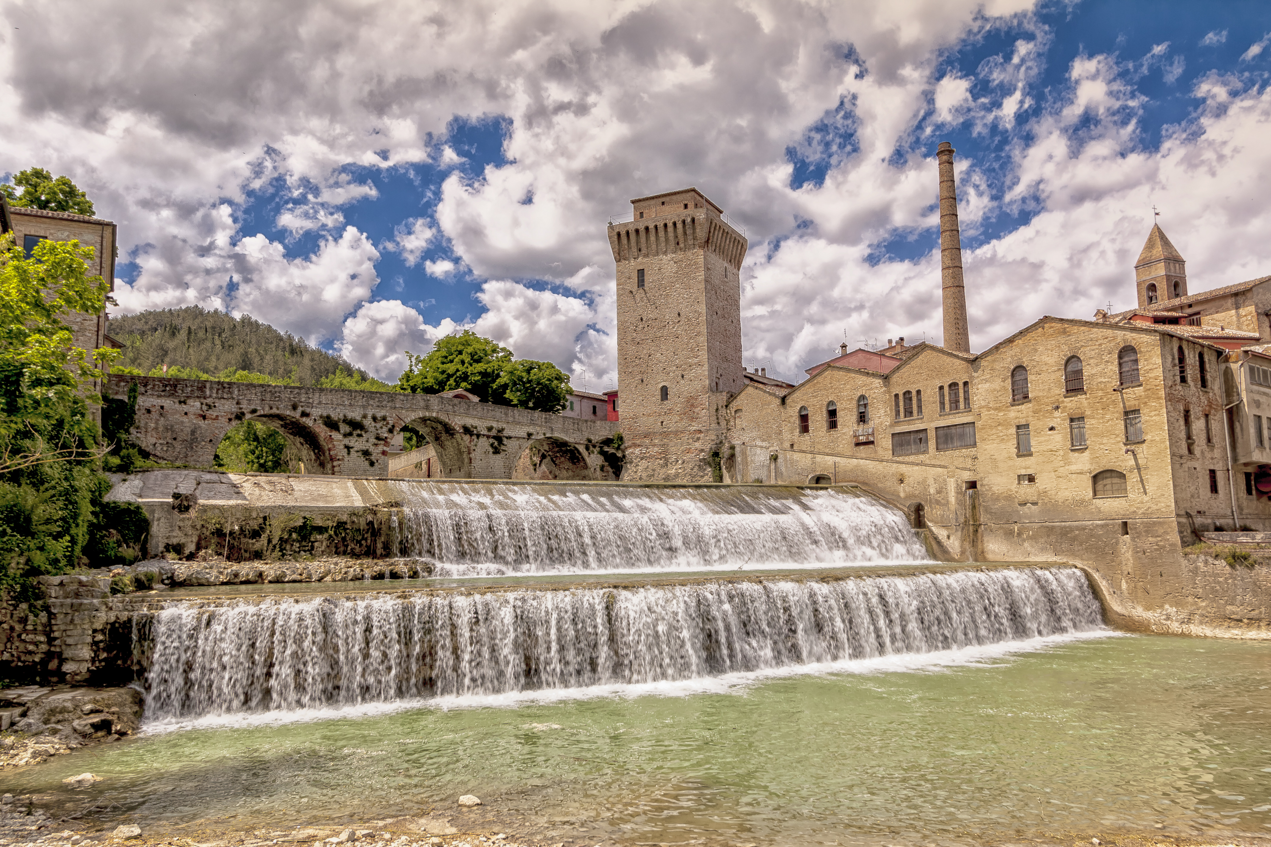 Cascata, Ponte e Torre di Fermignano This is a photo of a monument which is part of cultural heritage of Italy.